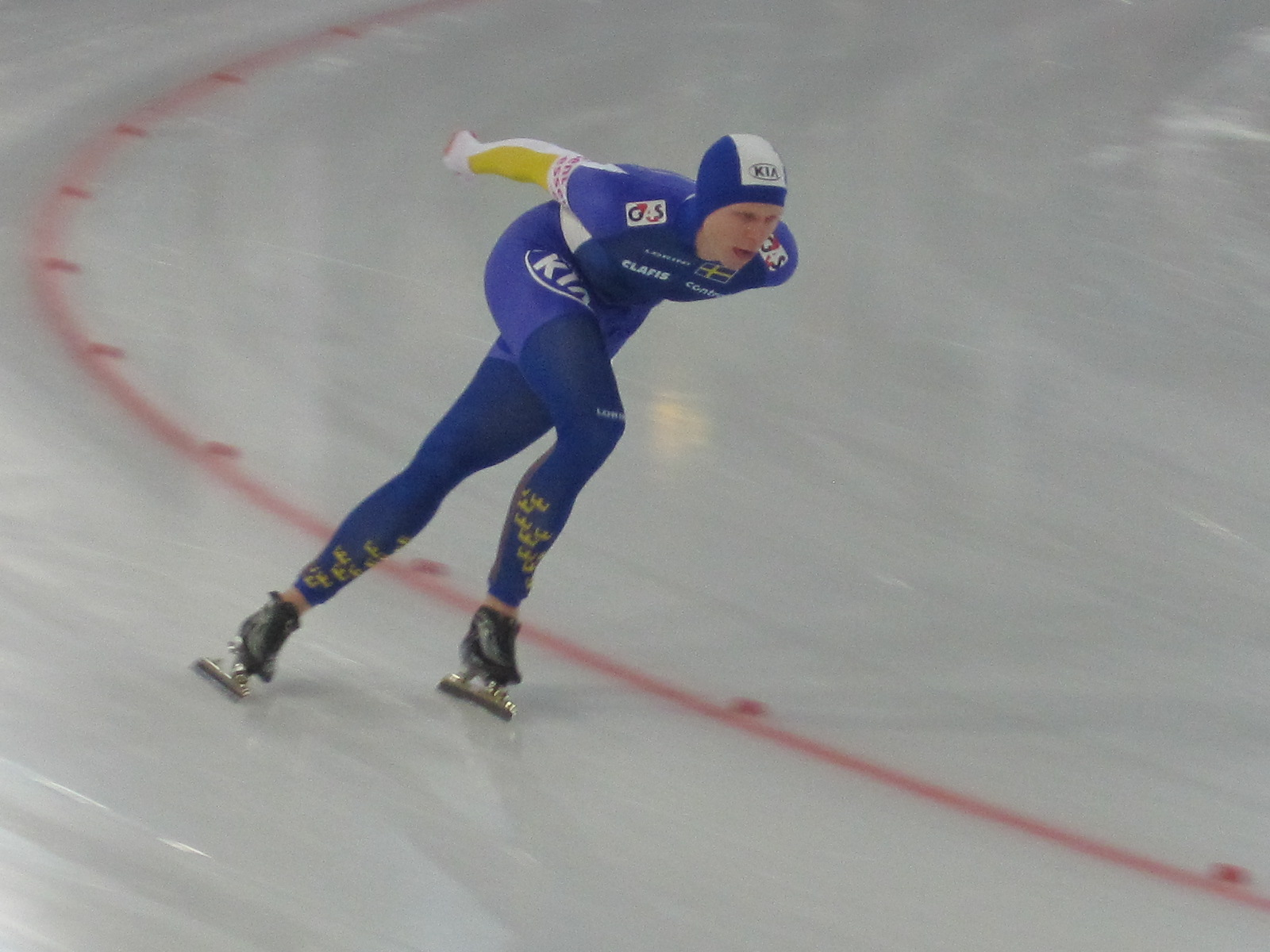 Joel Eriksson (Göteborg, 16 september 1984) is een Zweeds langebaanschaatser. -- Joel Eriksson tijdens de 10km op het EK Allround 2010 in Hamar.